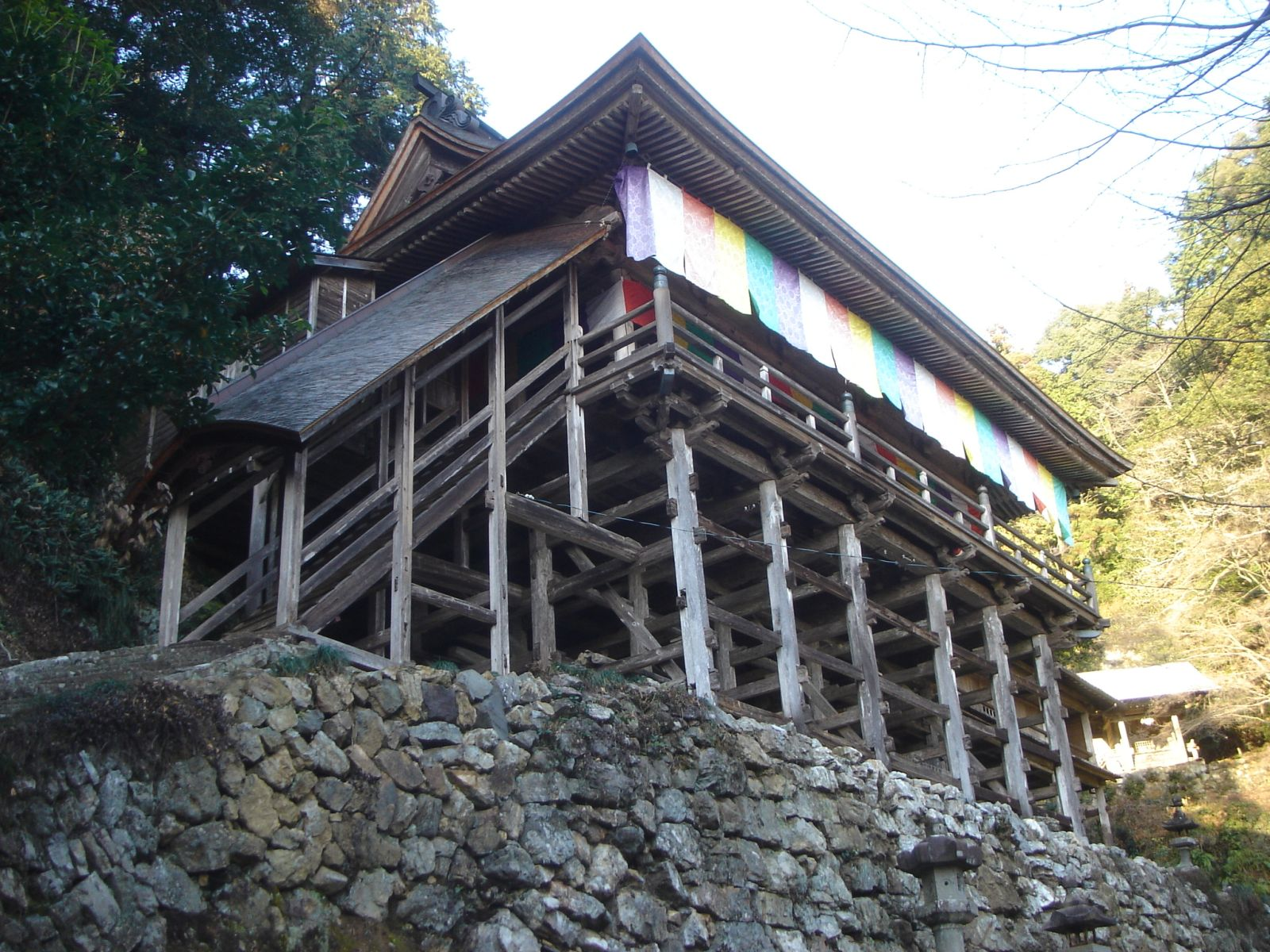 Nichiryuubuji(日龍峰寺の本堂,Seki,Gifu,Japan(岐阜県関市)で撮影。